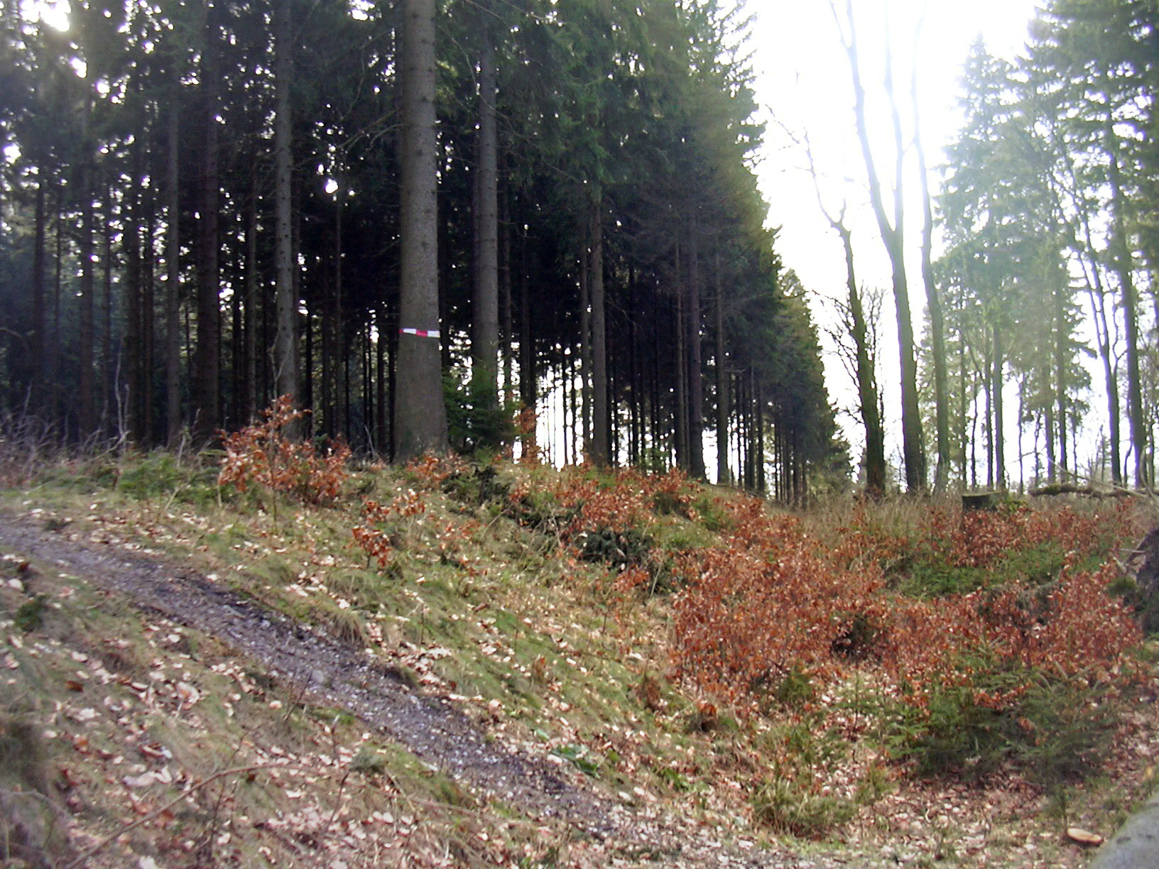 Limes near Großer Feldberg, Taunus/Germany